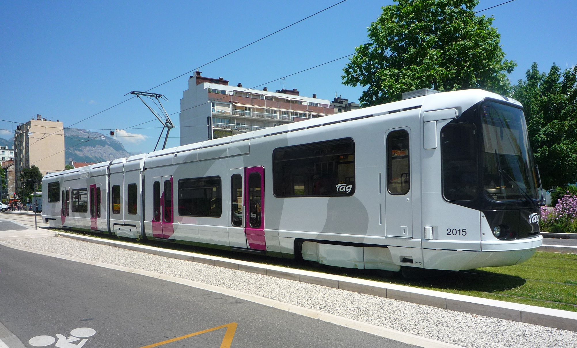 Tramway TFS (version rénovée) cours de la Libération-et-du- général-de-Gaulle - Grenoble